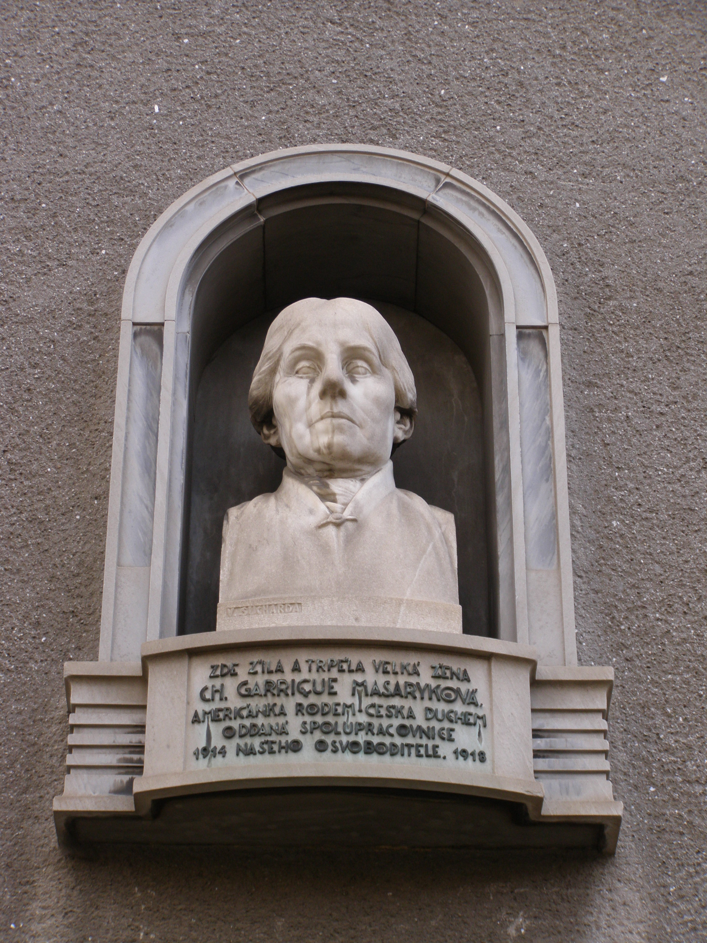 Praha, Hradčany, ulice Mickiewiczova 239/13, busta Charlotty G. Masarykové.